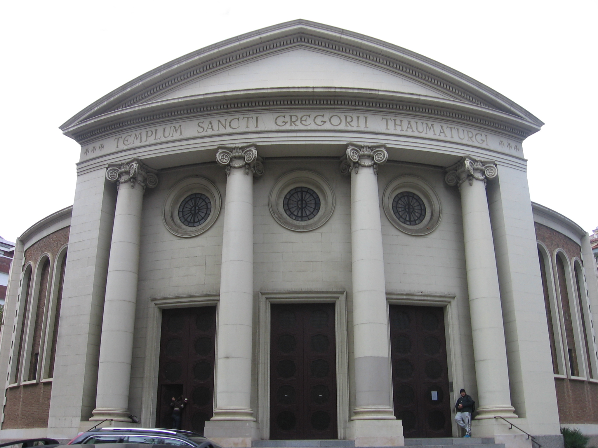 Iglesia de San Gregorio Taumaturgo.